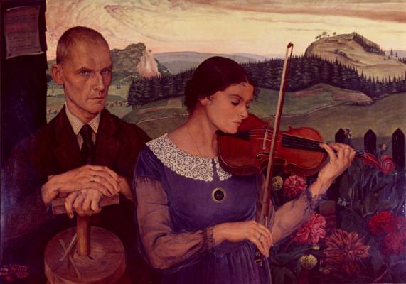 Foto eines Porträts von Eugen Senge-Platten und Alix Senge-Voss, gemalt von Werner Schramm, 1937